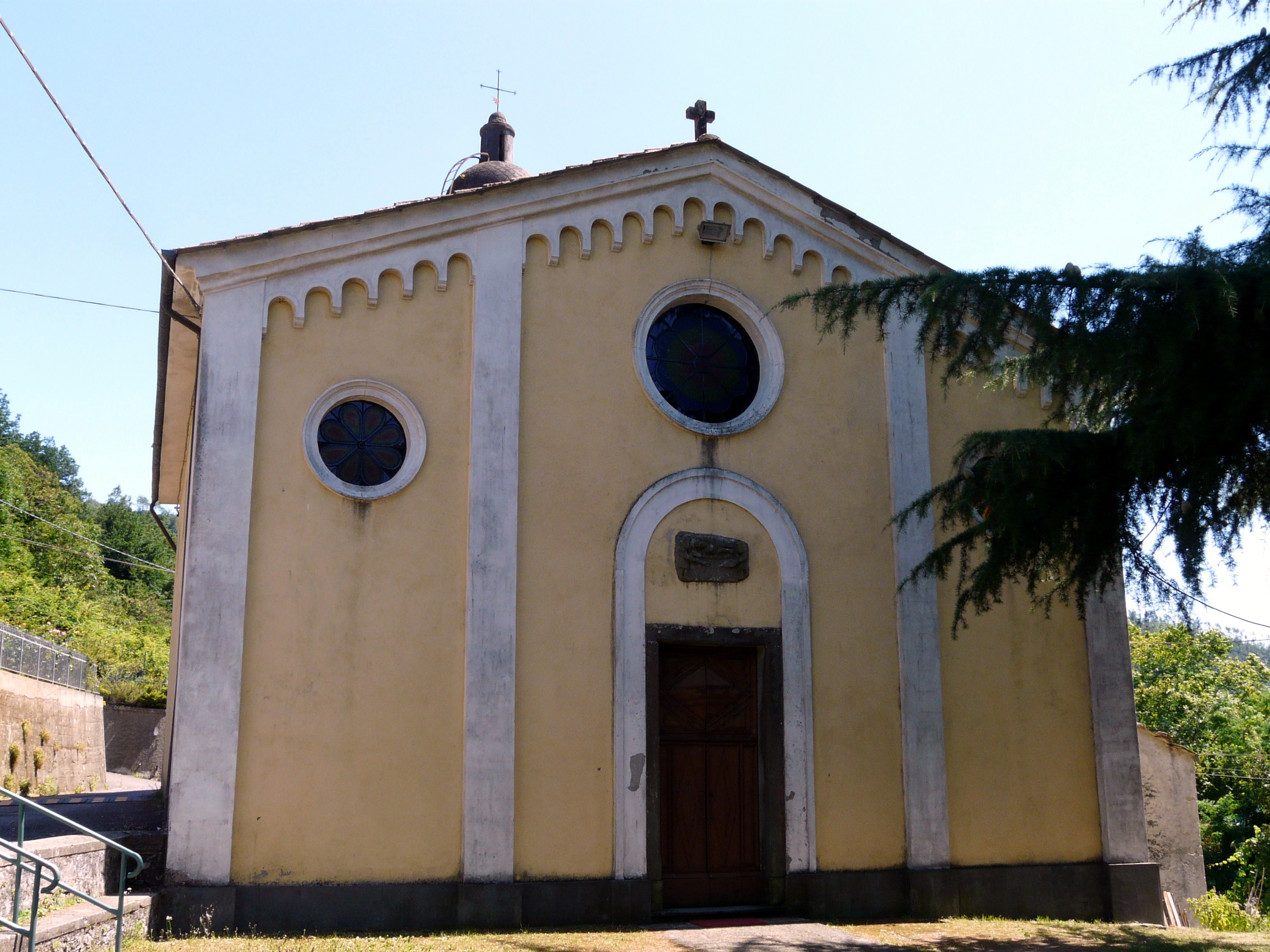 Chiesa di Oltre Vara, Beverino, Liguria, Italia